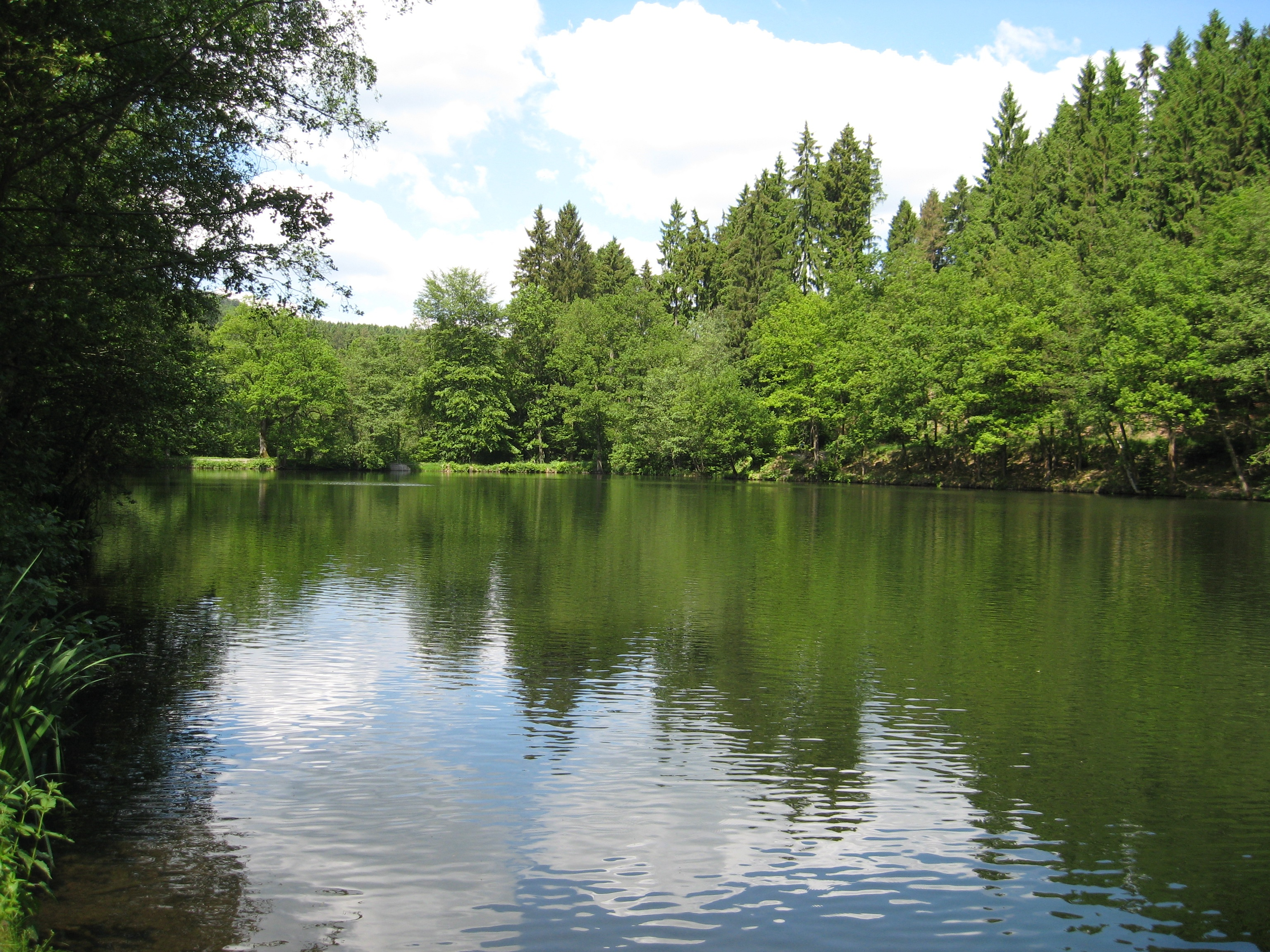 Der Landeskroner Weiher bei Wilden (Wilnsdorf, NRW) von Südost aus gesehen.